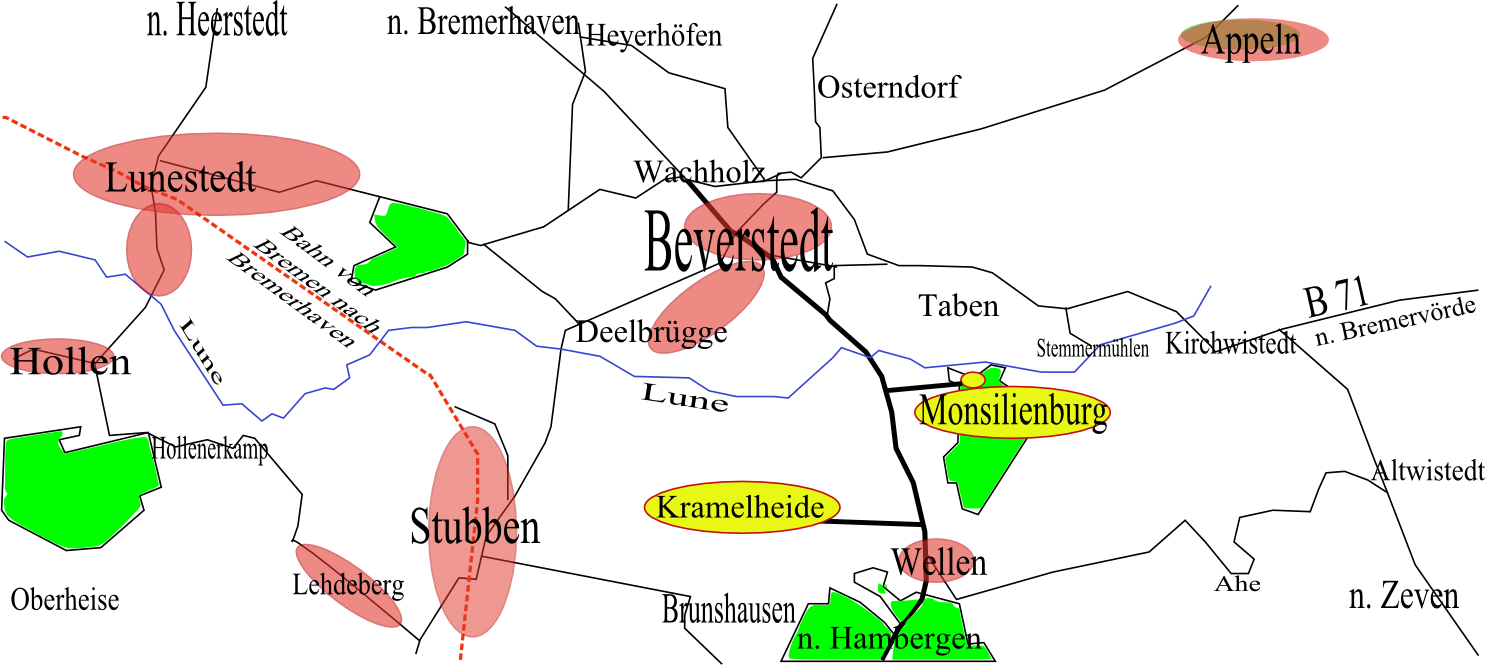 Lage der Monsilienburg zwischen Beverstedt und Wellen